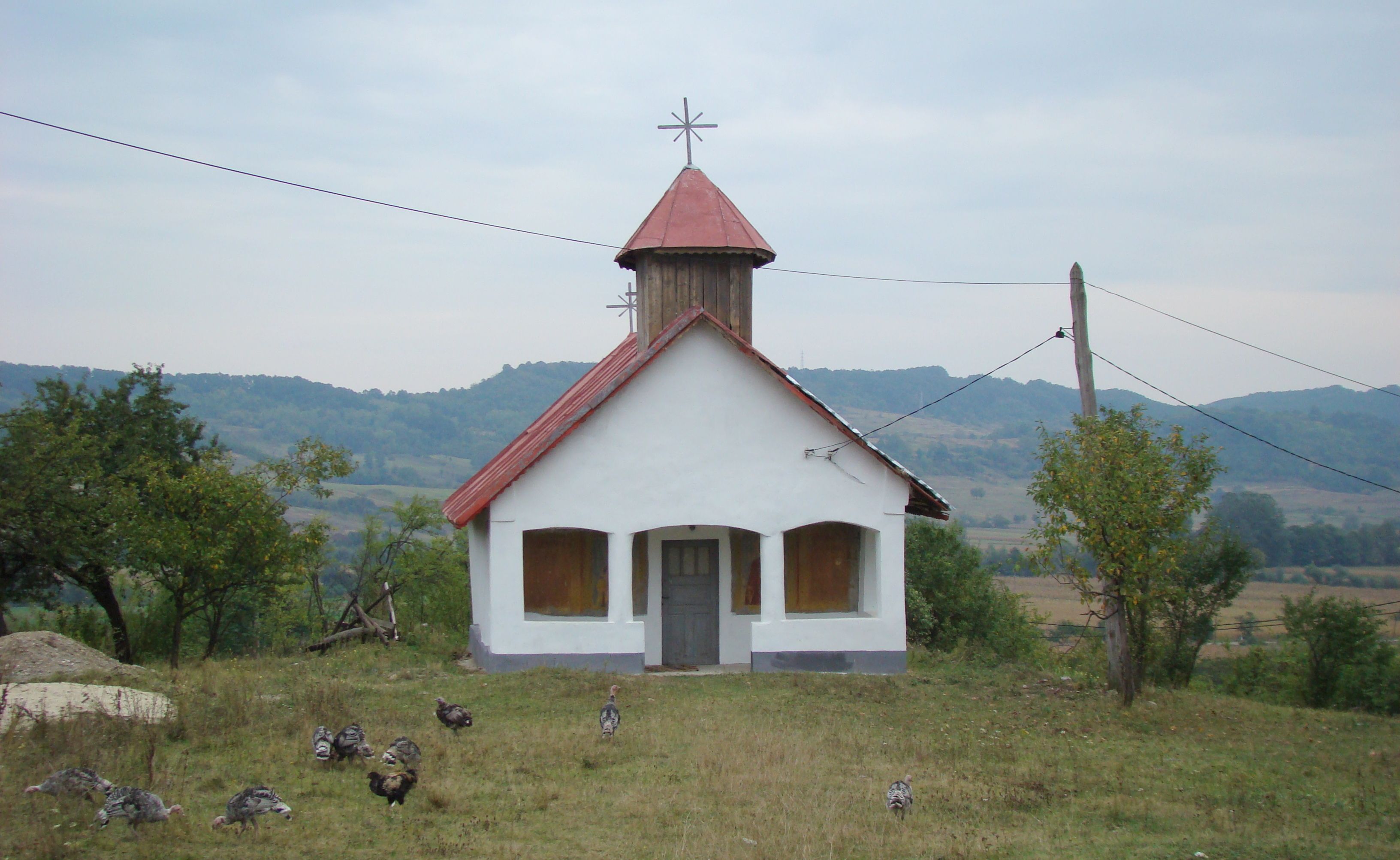 Biserica de lemn „Naşterea Maicii Domnului” din Căzăneşti, comuna Căzăneşti, județul Mehedinți